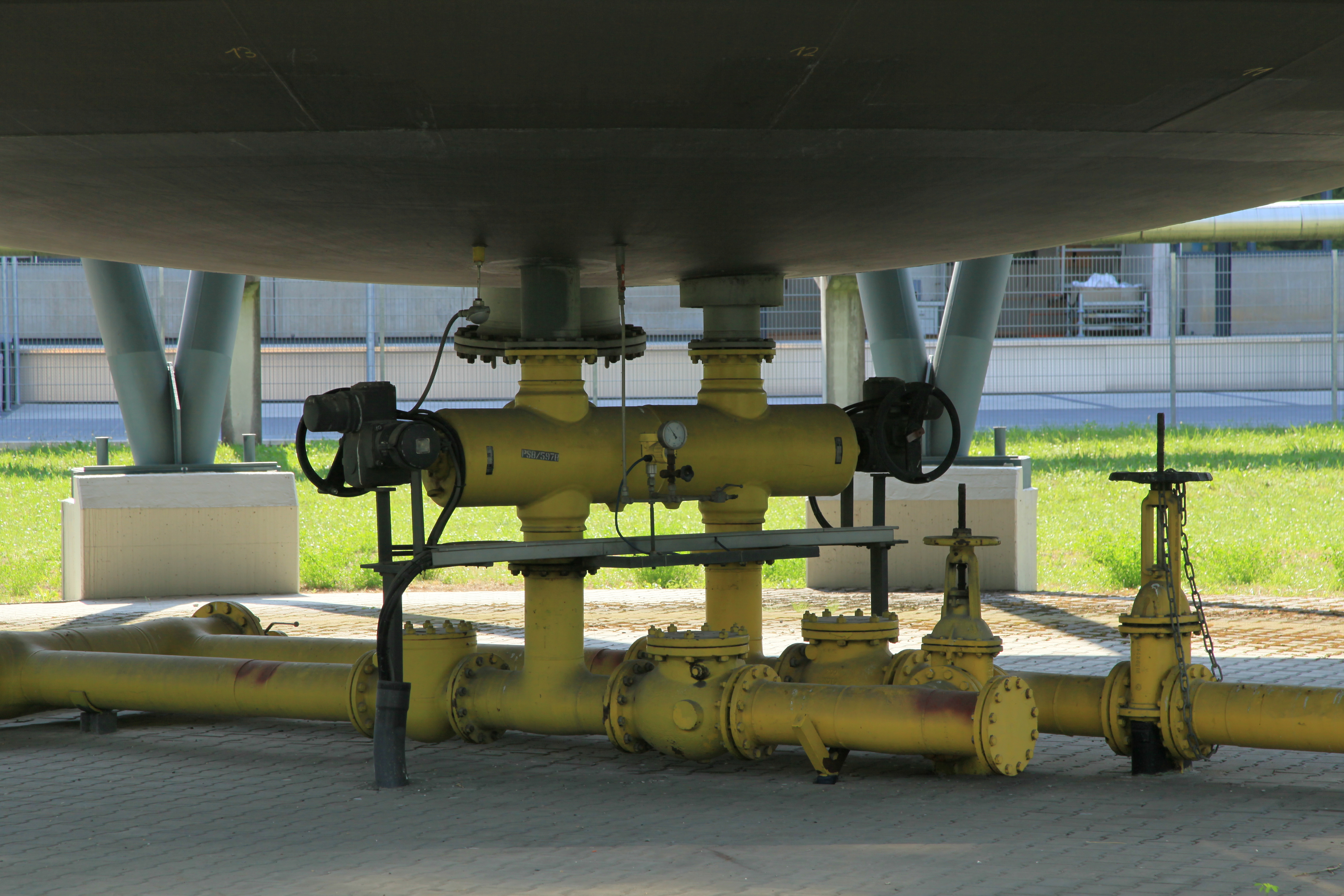 Kugelgasbehälter Pforzheim, Hohwiesenweg in Pforzheim